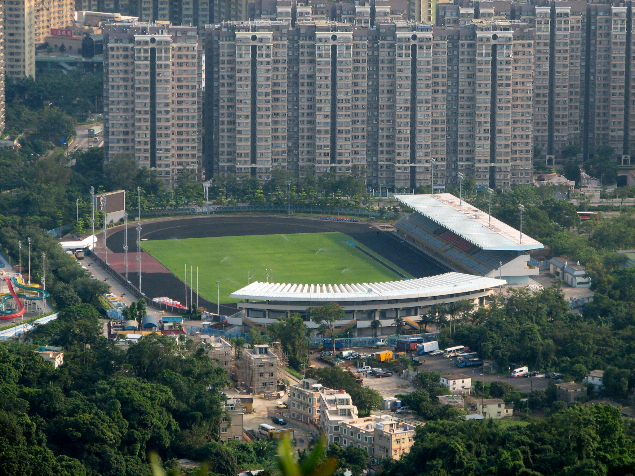 大埔運動場